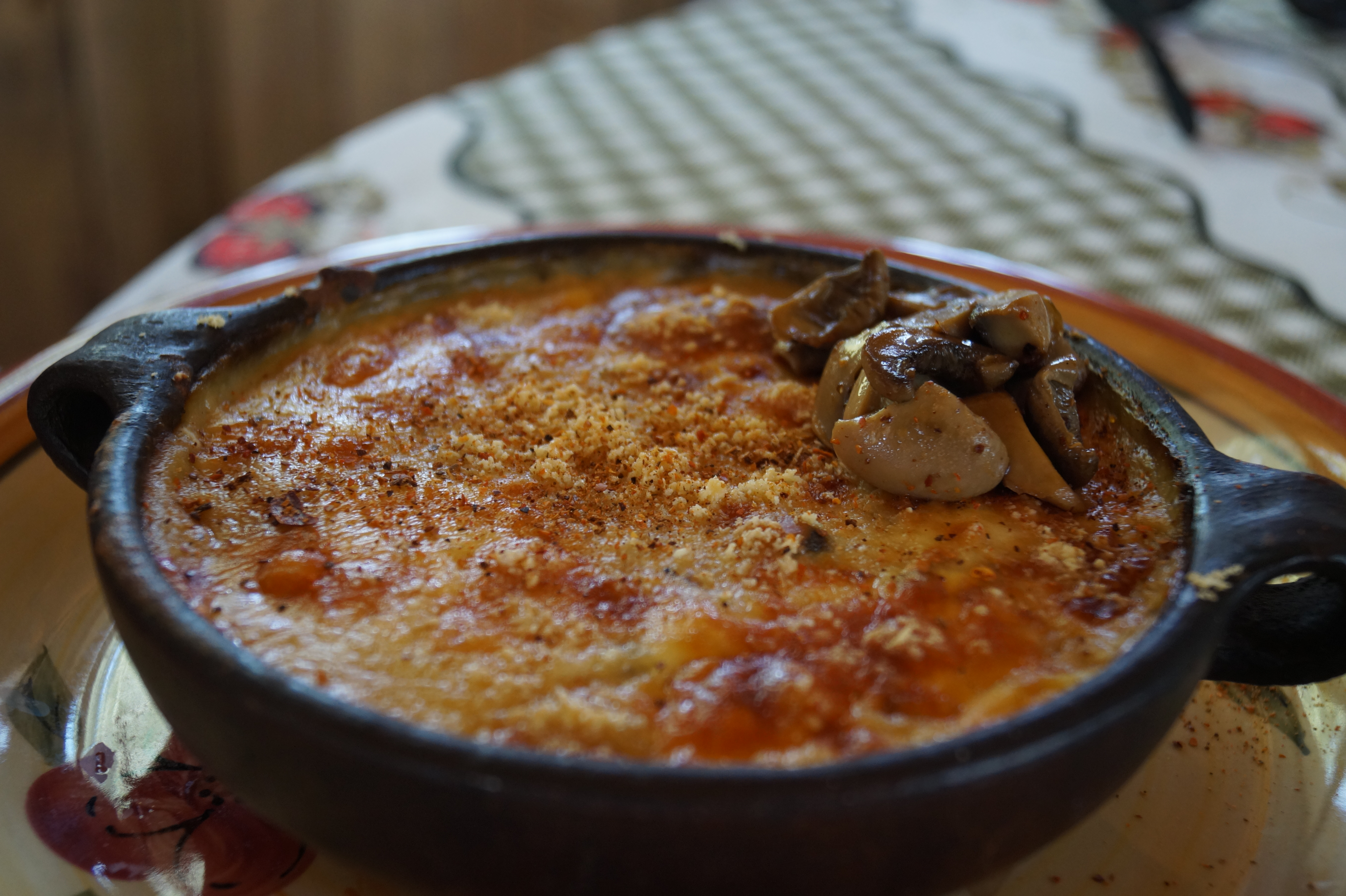 Preparacion caliente en base de carne de centolla desmenuzada, pan rallado, crema y queso preparado al horno